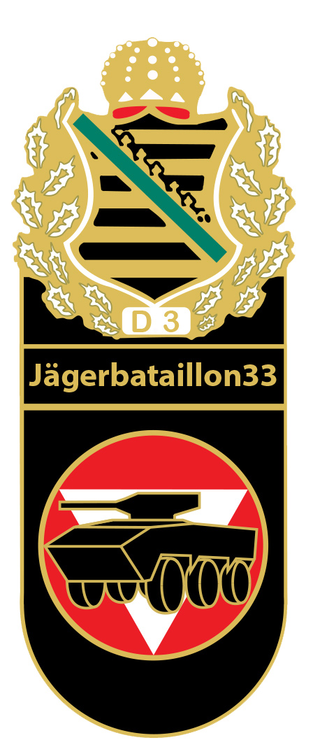 Verbandsabzeichen des JgB33, das kgl. sächsische Wappen enthalten